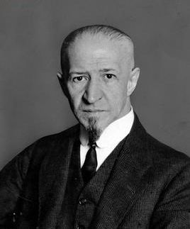 Juliusz Twardowski - polityk